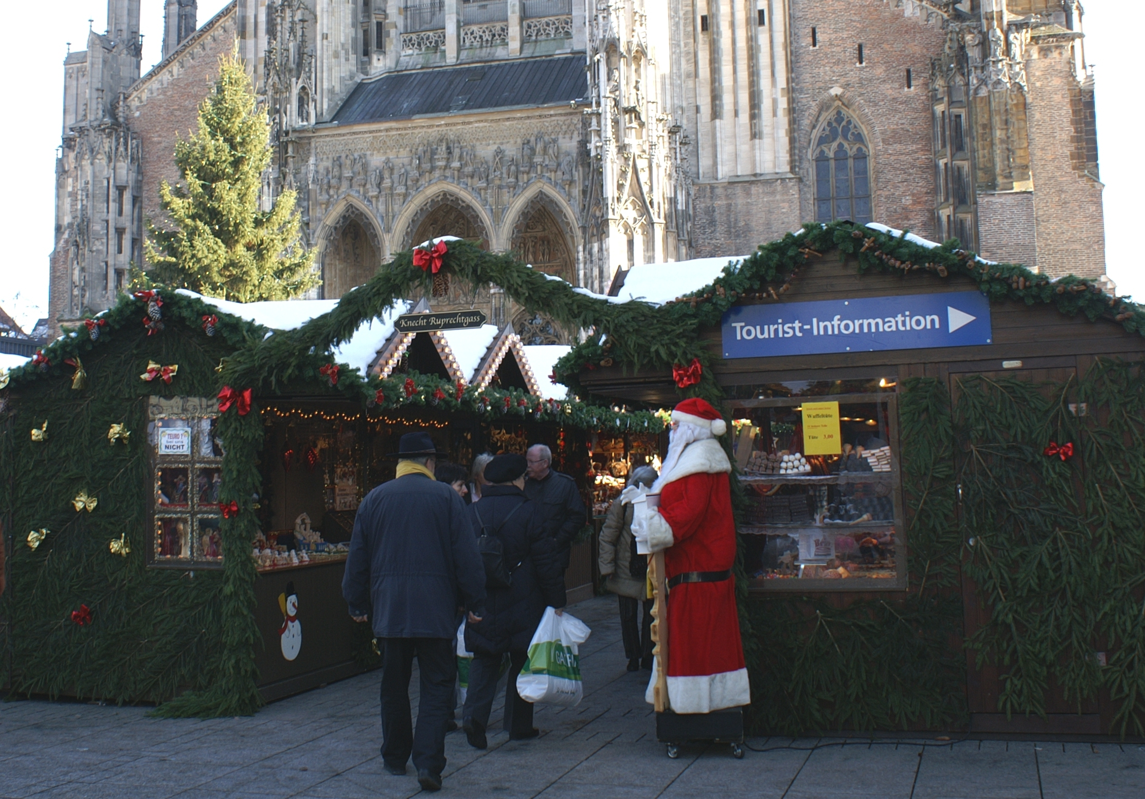 Budenstadt beim Ulmer Weihnachtsmarkt vor dem Münsterportal